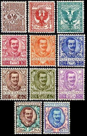 Immagine della serie di francobolli detta "Floreale"